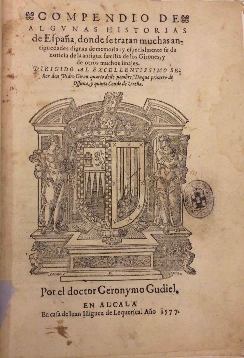 Compendio de algunas historias de España, dónde se tratan muchas antigüedades dignas de memoria y especialmente se da noticia de la antigua familia de los Girones y de otros muchos linajes, de Jerónimo Gudiel, impreso en 1577 en Alcalá de Henares por Juan Íñiguez de Lequerica. Xilografía de Antonio de Arfe y Villafañe.